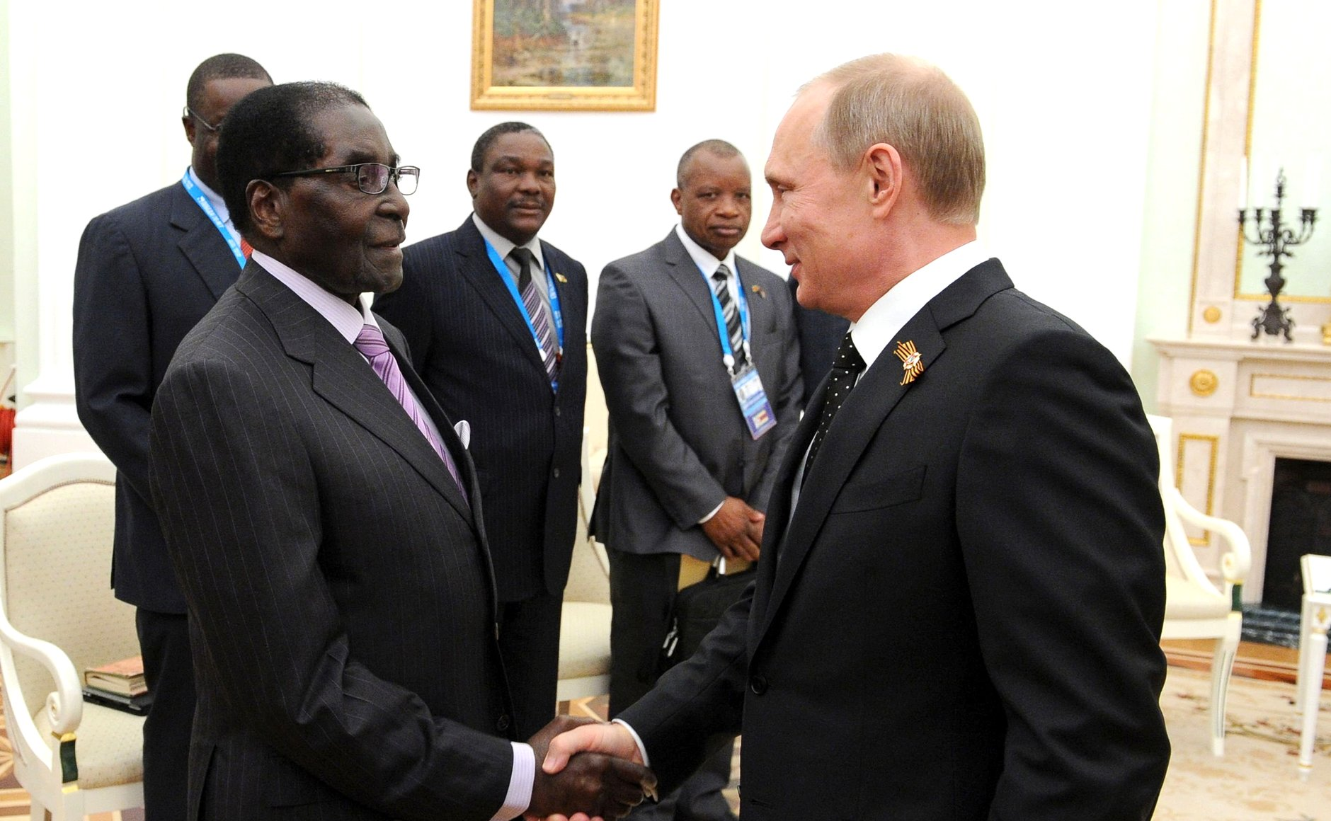 Президент России владимир Путин с Президентом Зимбабве, председателем Африканского союза Робертом Мугабе